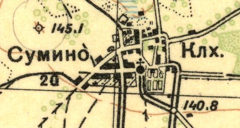 Топографическая карта Ленинградской области, квадрат О-35-23-Г (Волосово), деревня Сумино